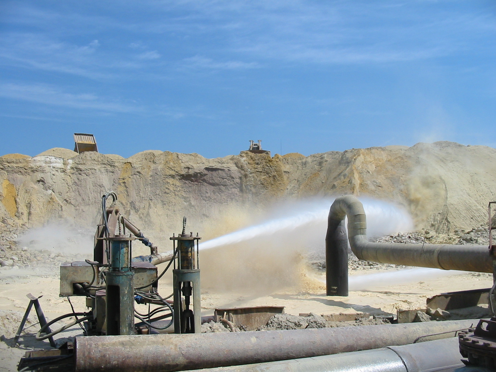 Hydromonitor